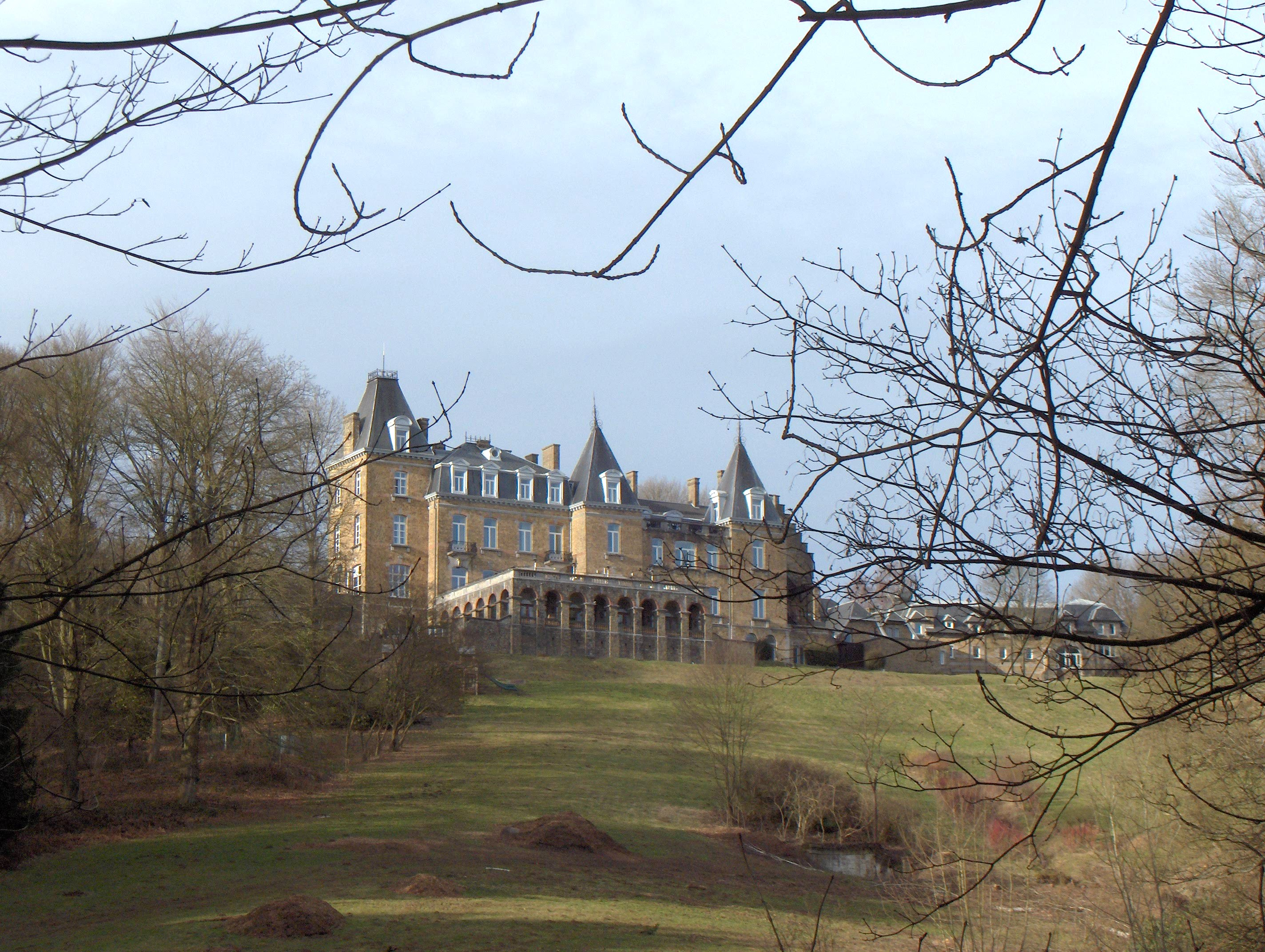 Maillen (Ortsteil der Gemeinde Assesse, Prov. Namur, Belgien): Domaine de Ronchinne, Anfang des 20. Jh.s, ehemalige Wohnung der Prinzessin Clémentine, Tochter des belgischen Königs Leopold II.